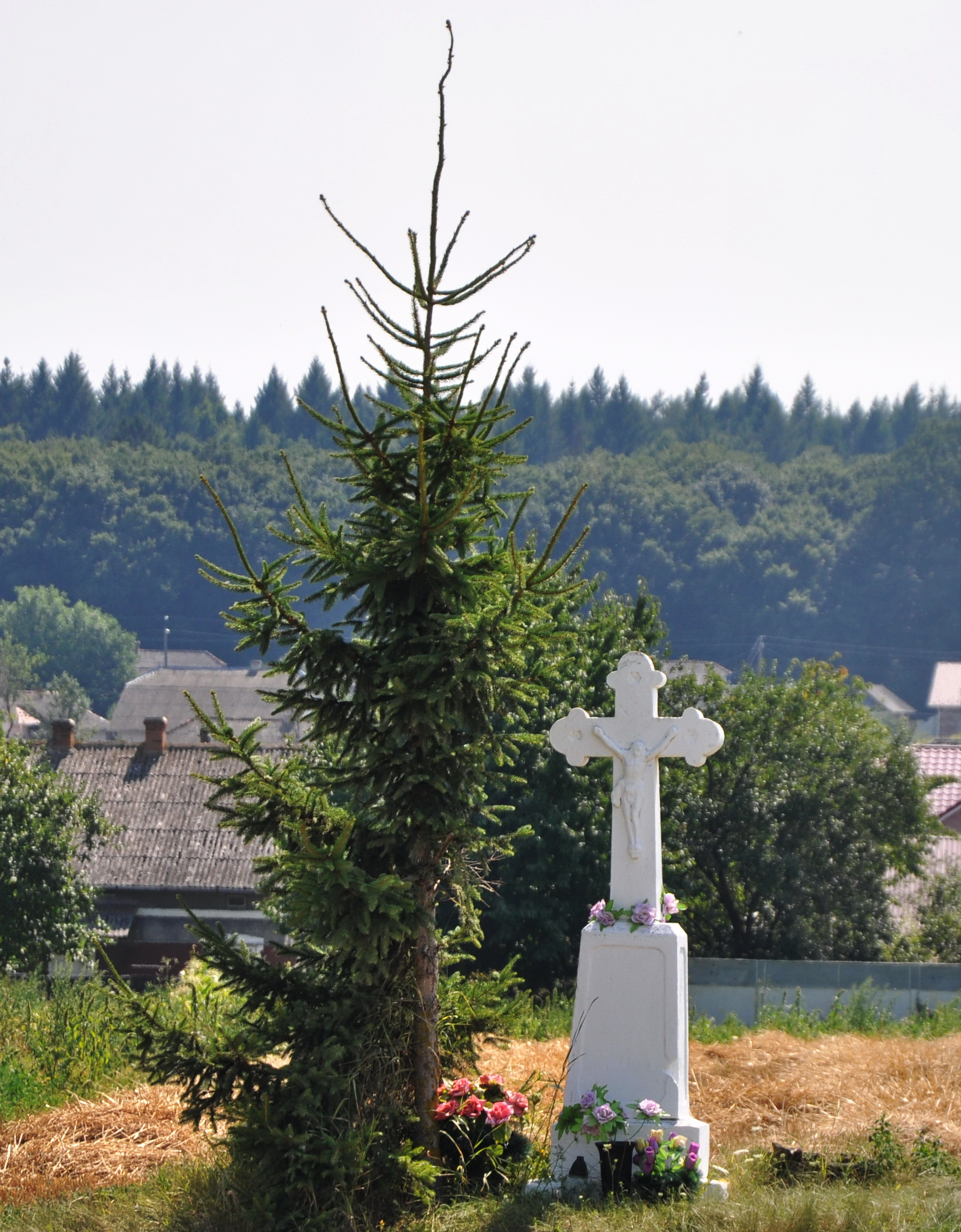 Хрест в пам'ять надання свободи в селі Шманьківчики Чортківського району Тернопільської області України.